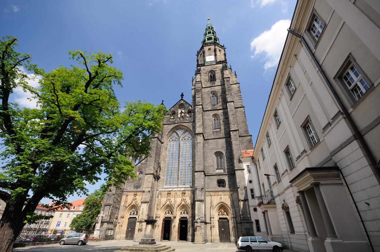 Katedra świdnicka - ledwo się zmieściła w kadrze.